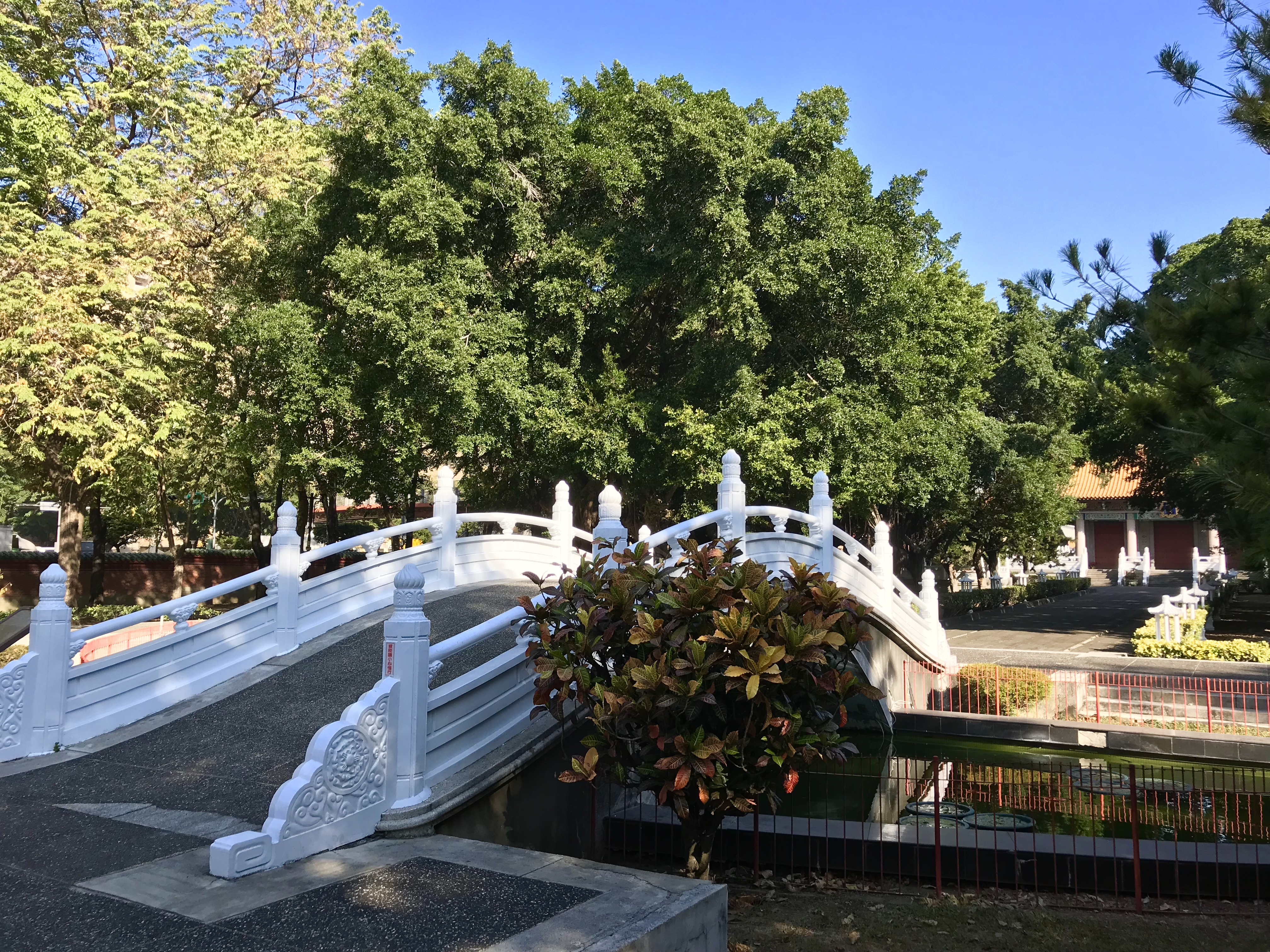 臺中孔子廟泮池